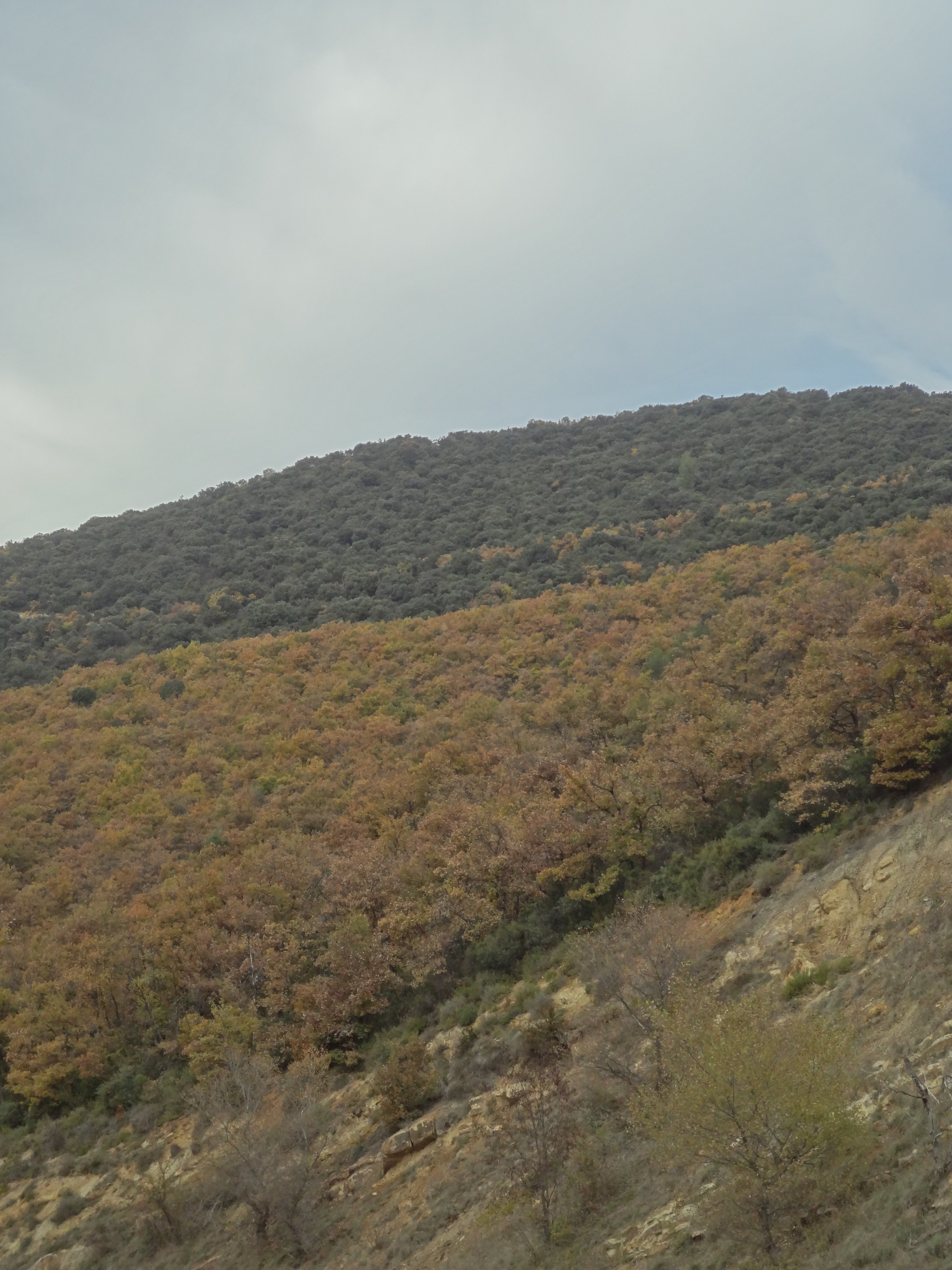 En bas, chênes pubescents ; en haut, chênes verts